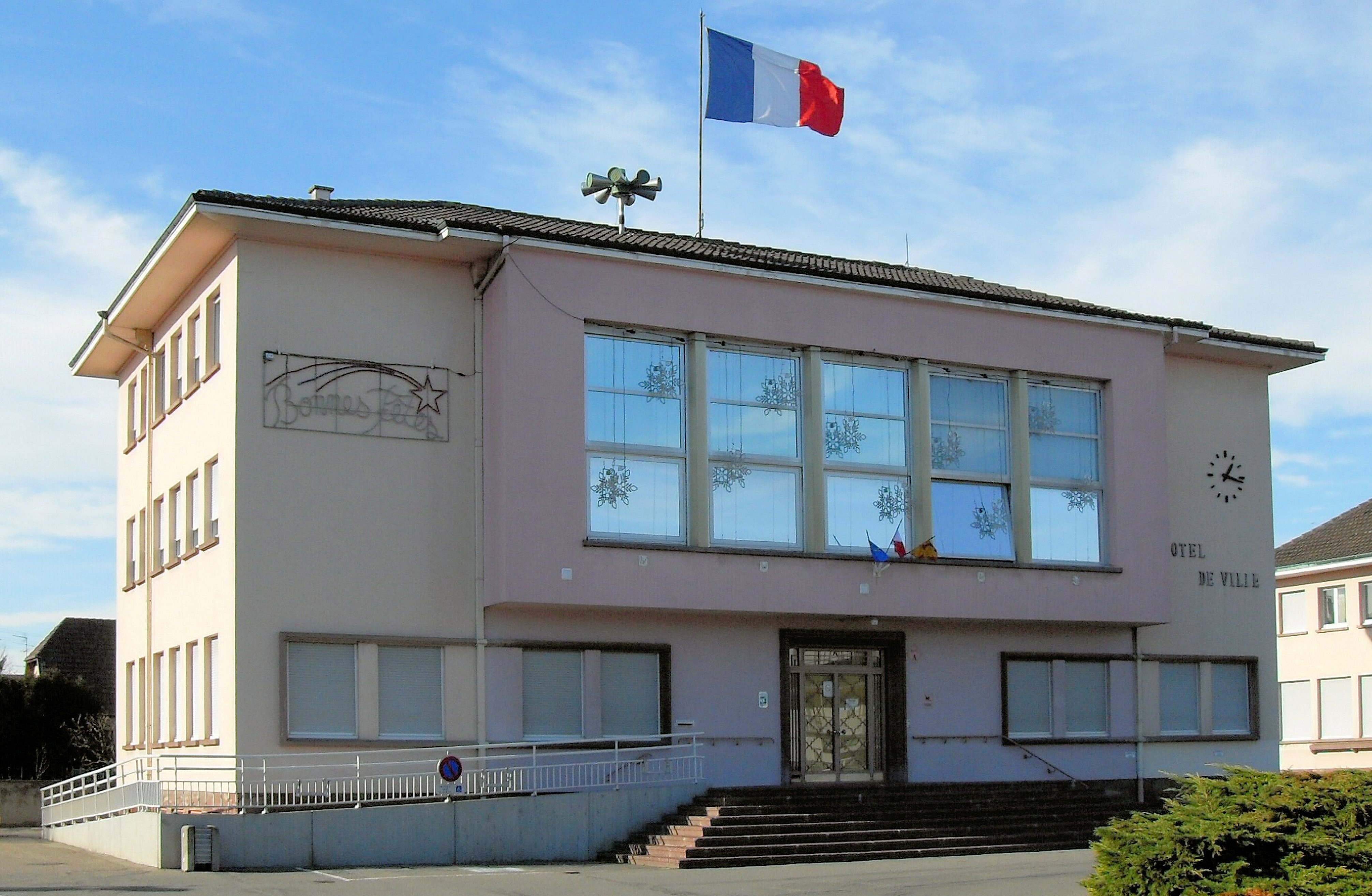 L'hôtel de ville de Kingersheim